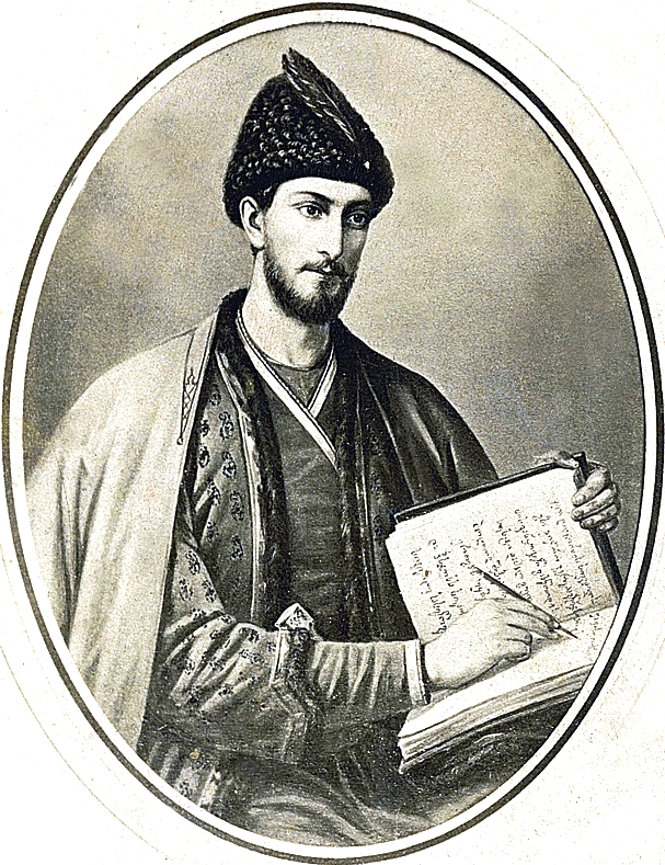 შოთა რუსთაველი. ადაღების ადგილი და თარიღი უცნობია.